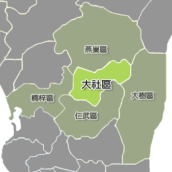 大社區相對位置